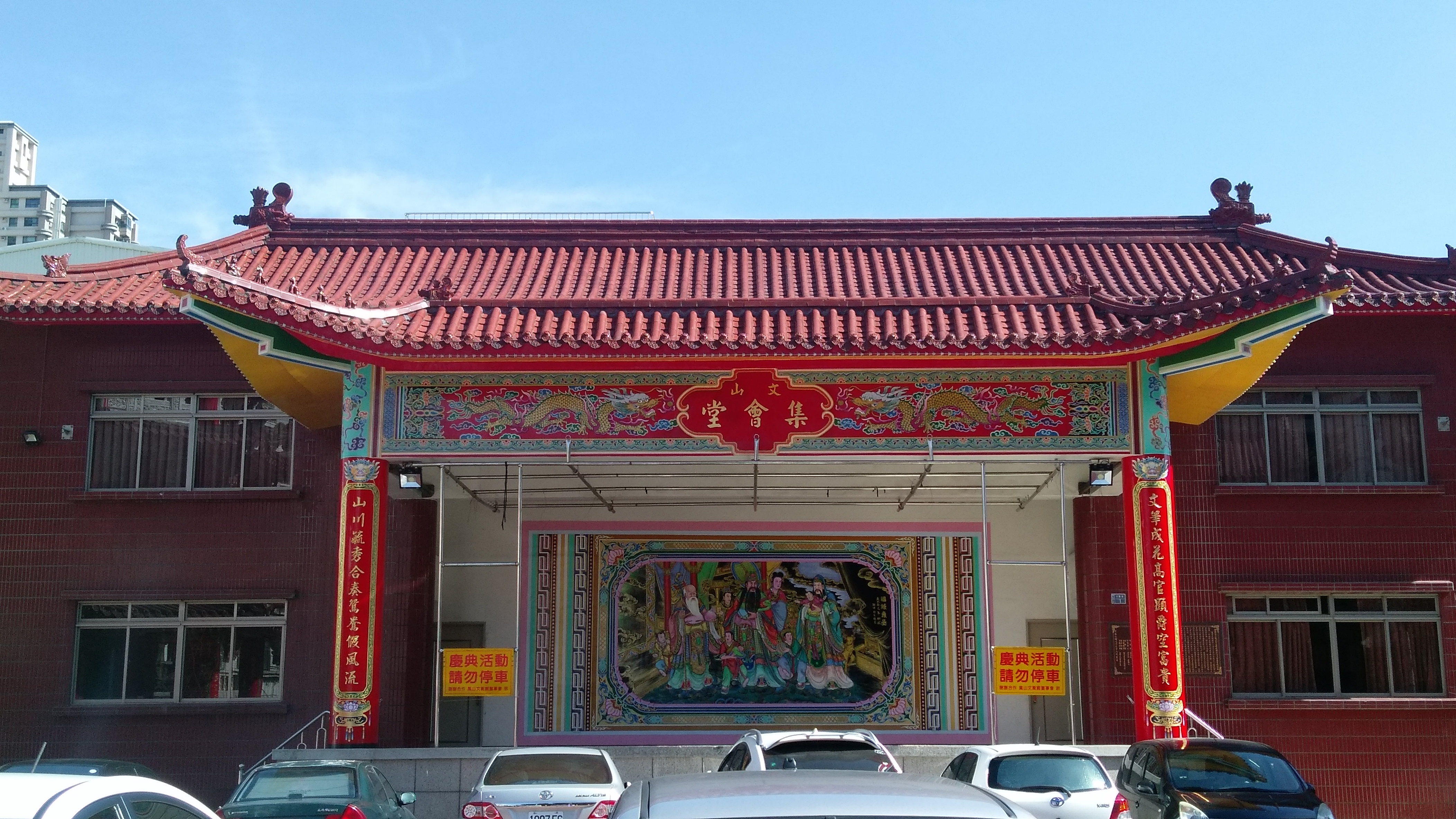 中文（台灣）: 高雄鳳山赤山文衡殿戲台